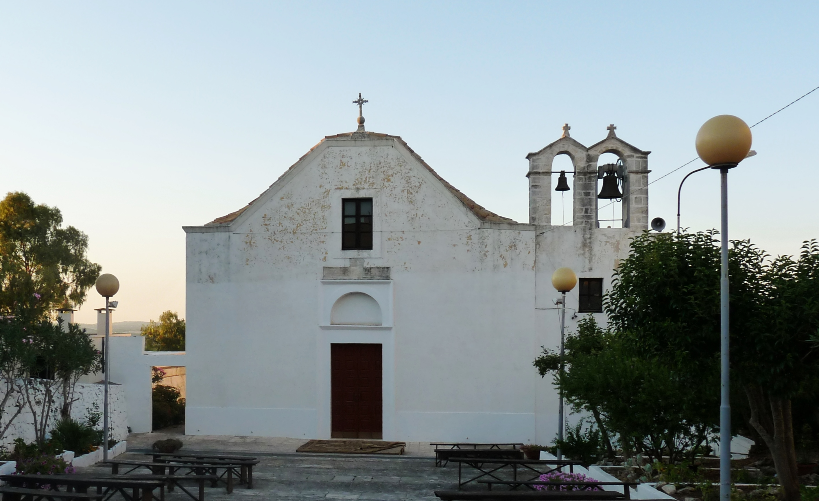 L'Abbazia di Sant'Anna è databile al IX secolo d.C., le prime notizie documentate risalgono al 1182 e sono contenute nel Codice Diplomatico Brindisino. La facciata dell'abbazia, semplice e lineare, è caratterizzata dai campanili a vela ad un fornice.